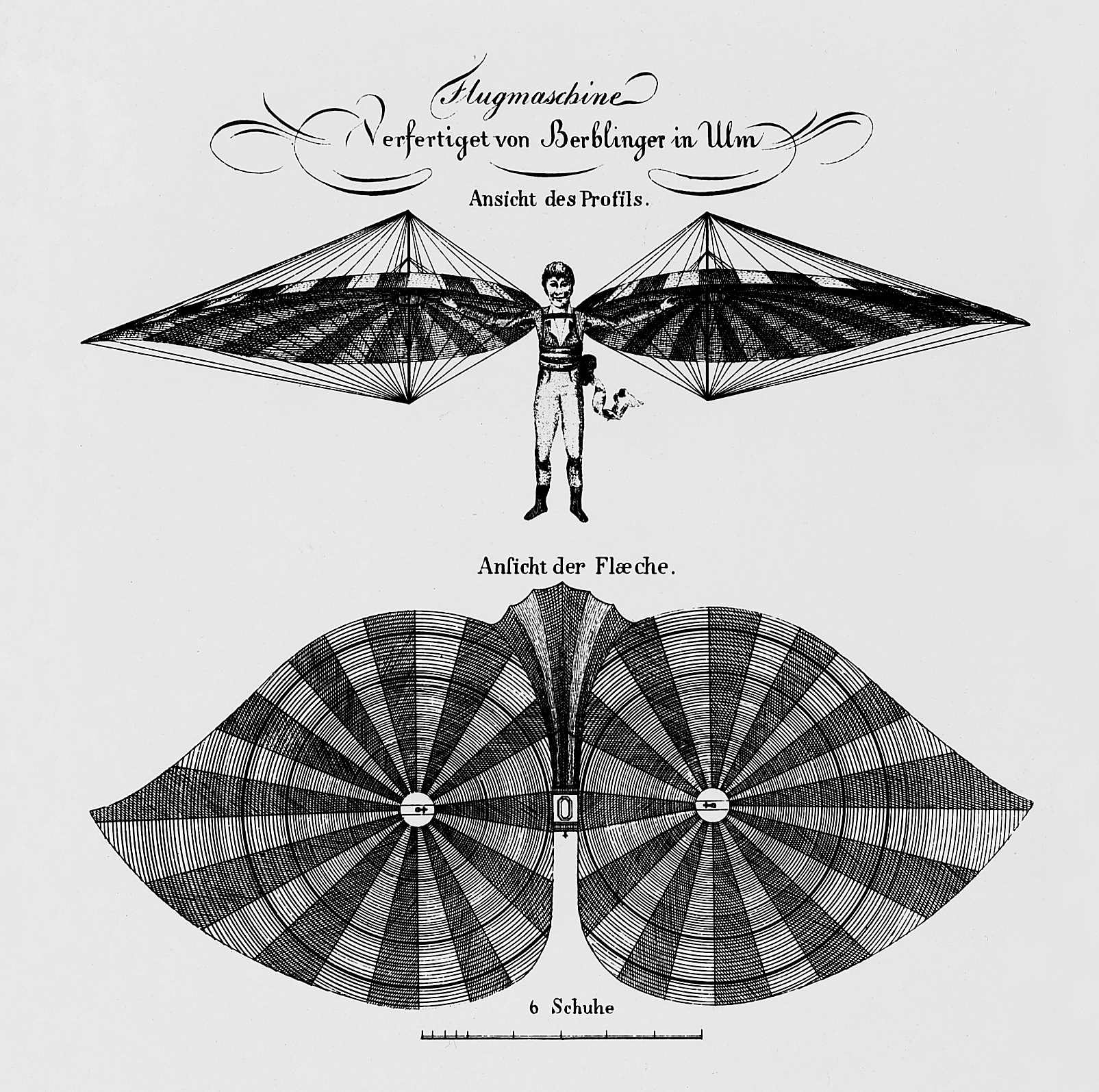 Flugmaschine von Albrecht Ludwig Berblinger, Kupferstich von Johannes Hans, 1811. Stadtarchiv Ulm